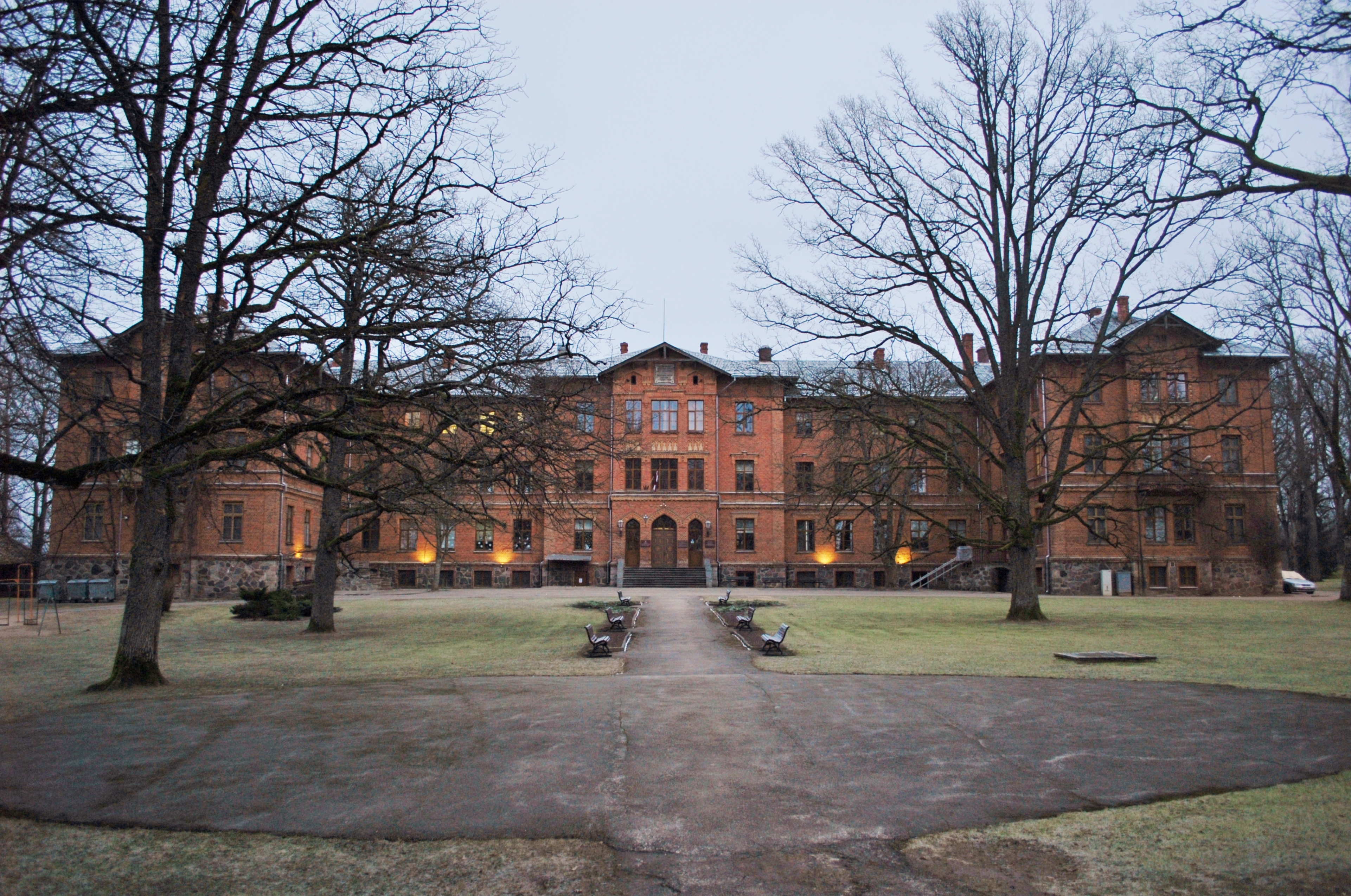 Bērzaines ģimnāzija